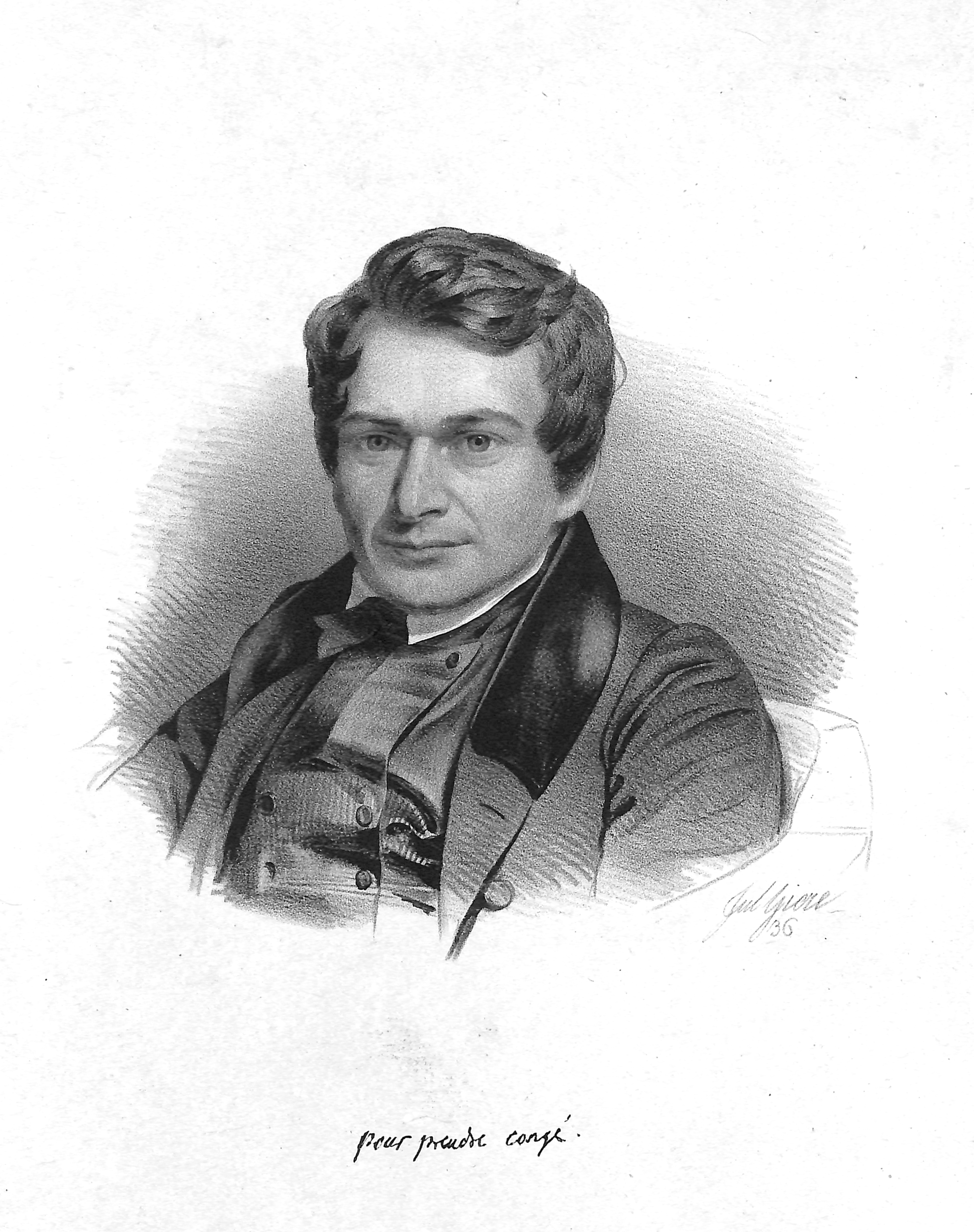 Portrait de Johann Hermann Detmold en 1836 lithographié par Julius Giere